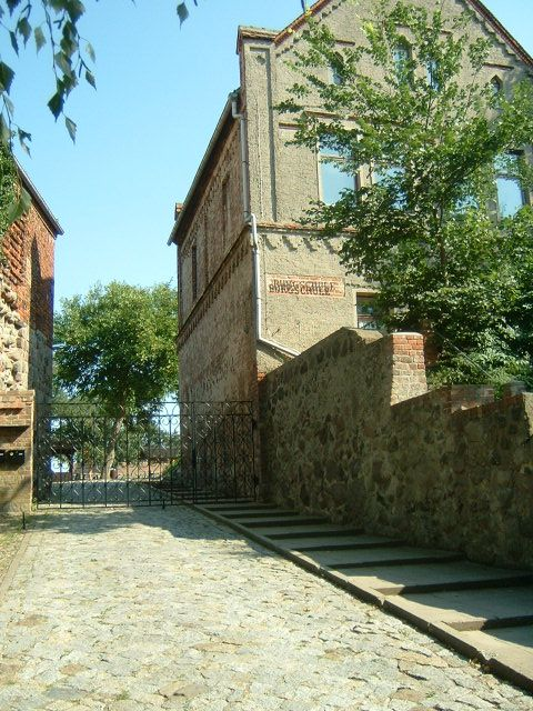 Eingang zur Burgschule in Wredenhagen in Mecklenburg Vorpommern, gleichzeitig der Eingang zum Burghof der ehemaligen Burg